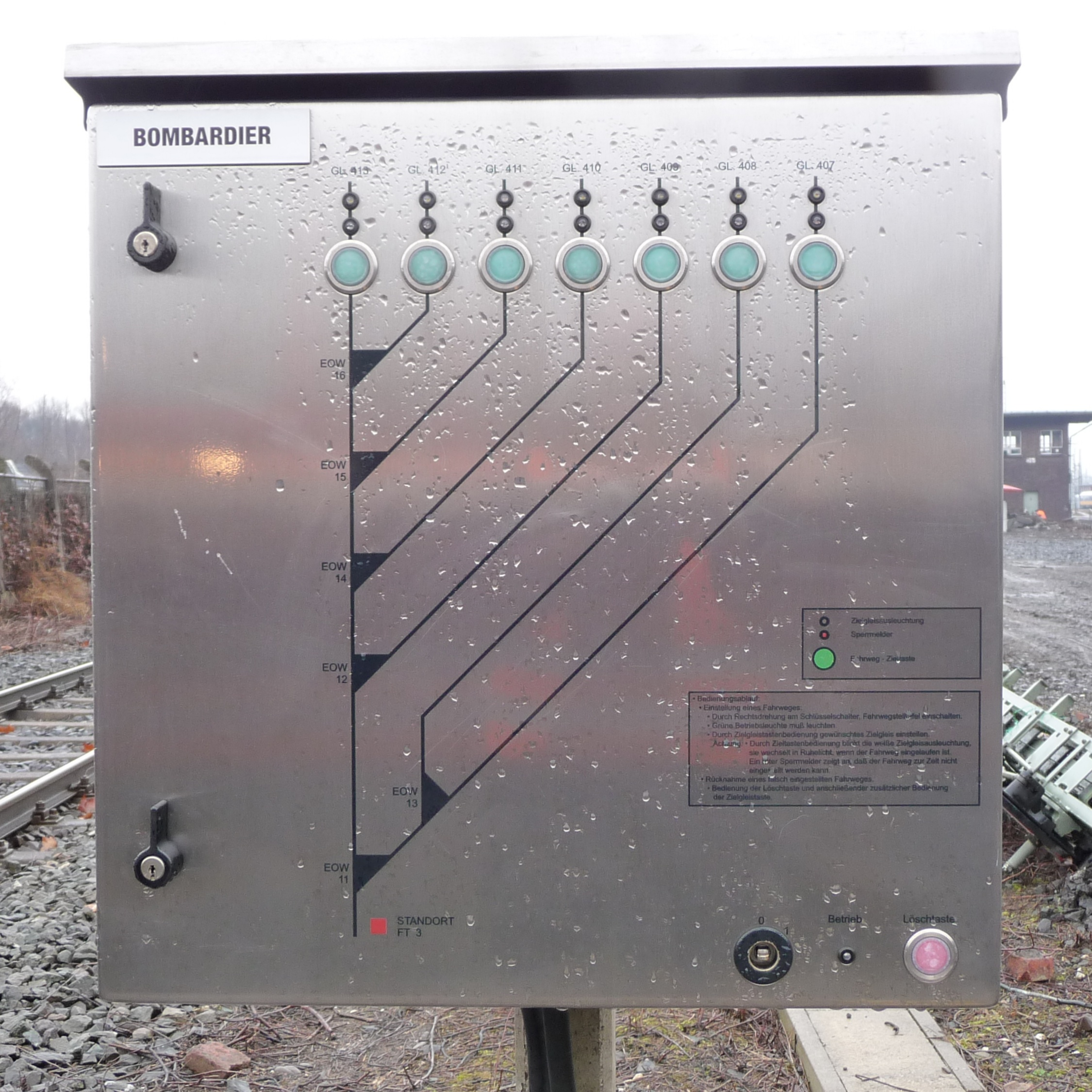 Stelltafel des EOW-Bereichs in Dortmund Bbf